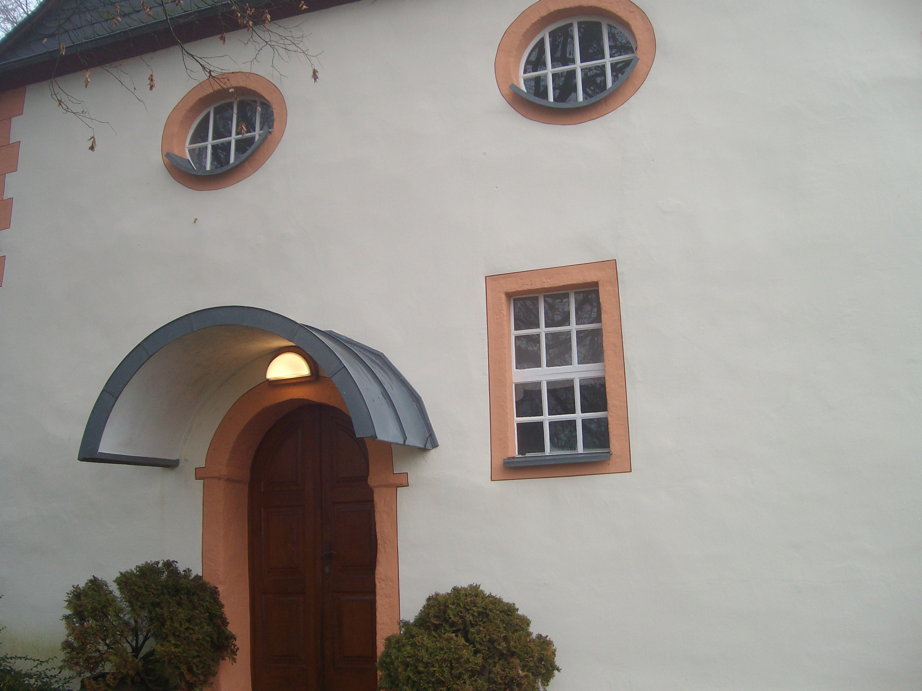 Evangelische Kirche Harbach, Grünberg, Landkreis Gießen, Hessen, Deutschland